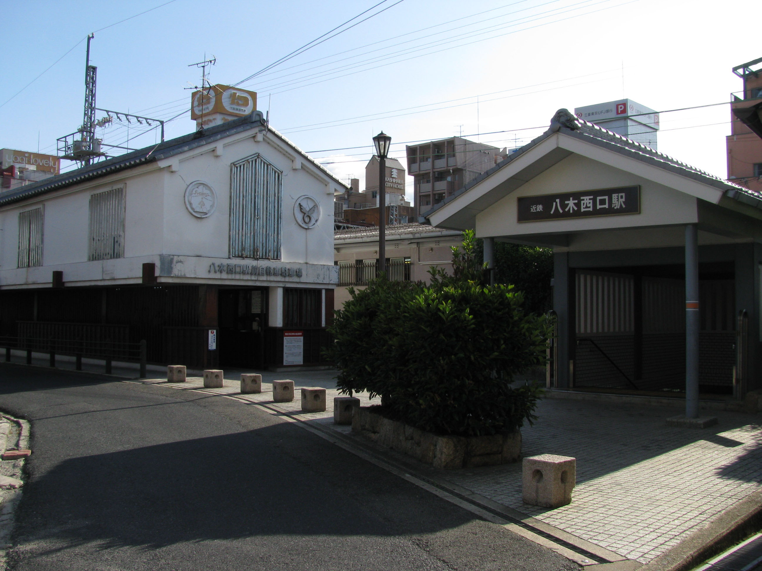 近鉄橿原線八木西口駅